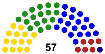 titulo se explica solo